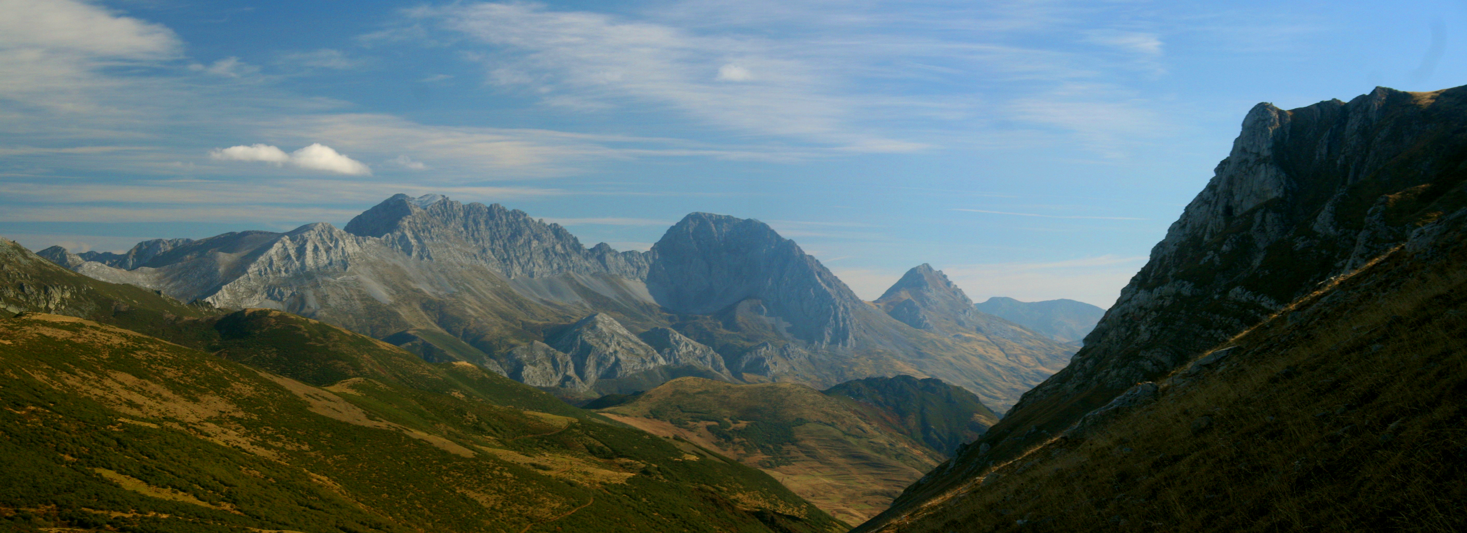 Panorámica de Las Ubiñas desde el Camino Real Puerto de la Mesa